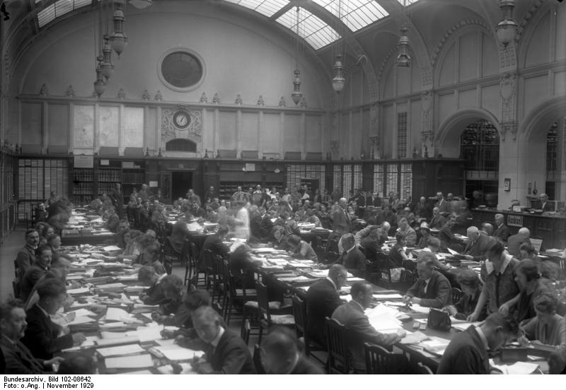 Interessante Aufnahmen aus dem Reichs-Patentamt in Berlin! Blick in die grosse Auslegehalle des Reichspatent-Amtes in Berlin. Hier werden täglich die neueingehenden Erfindungen ausgelegt und durch Sachverständige geprüft.